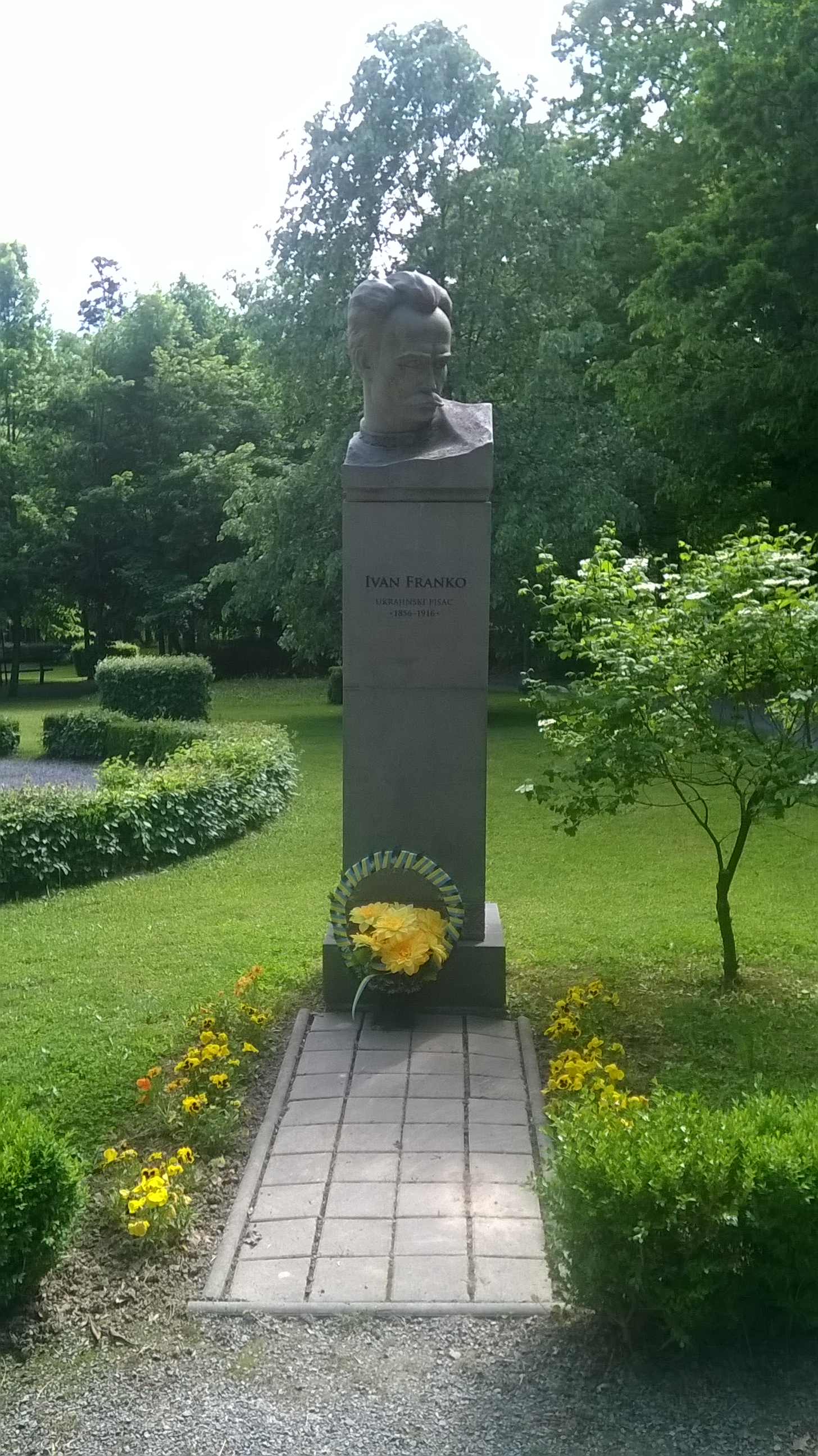 Ivan Franko Denkmal, Lipik